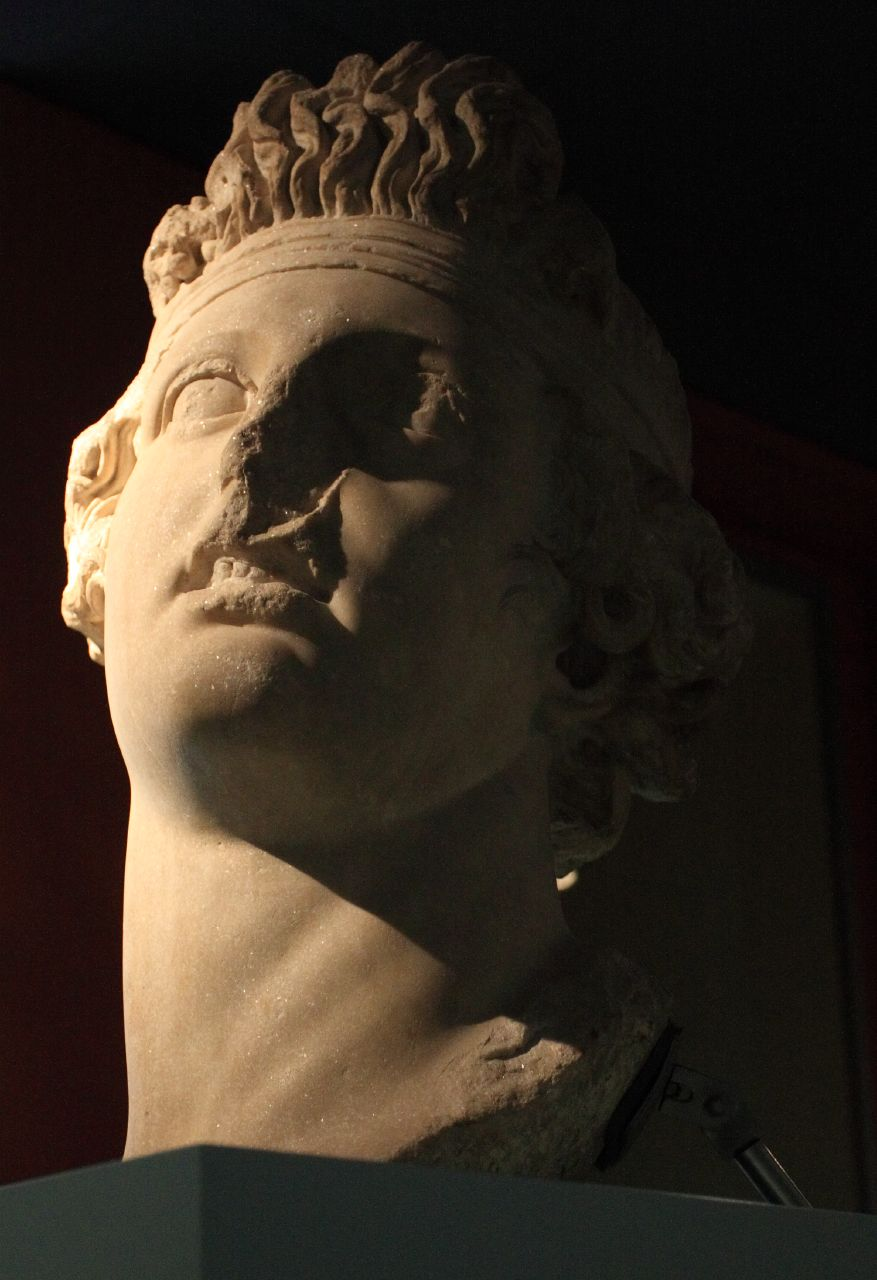 Venster 2 (De wapens van Jan van Valkenburg en zijn echtgenoot Johanna van Voorne, vrouwe van Bergen op Zoom.)Kop van de god Dionysos In het kader van Wiki Loves Art NL.